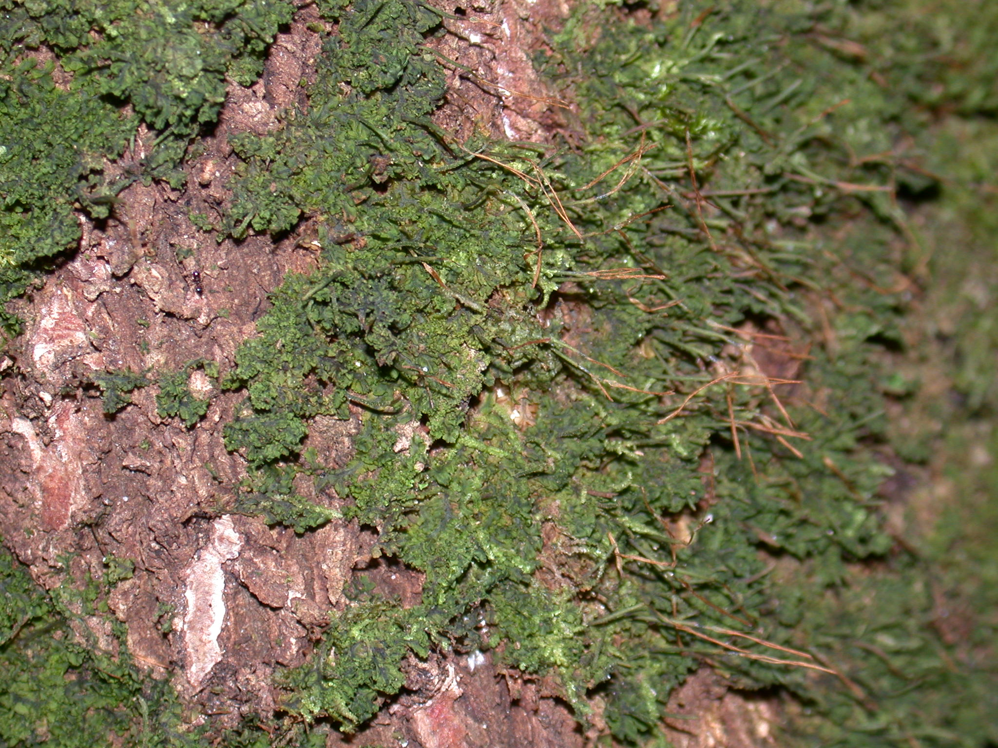 Imagem de Dendroceros sp., São Francisco do Sul, brasil.